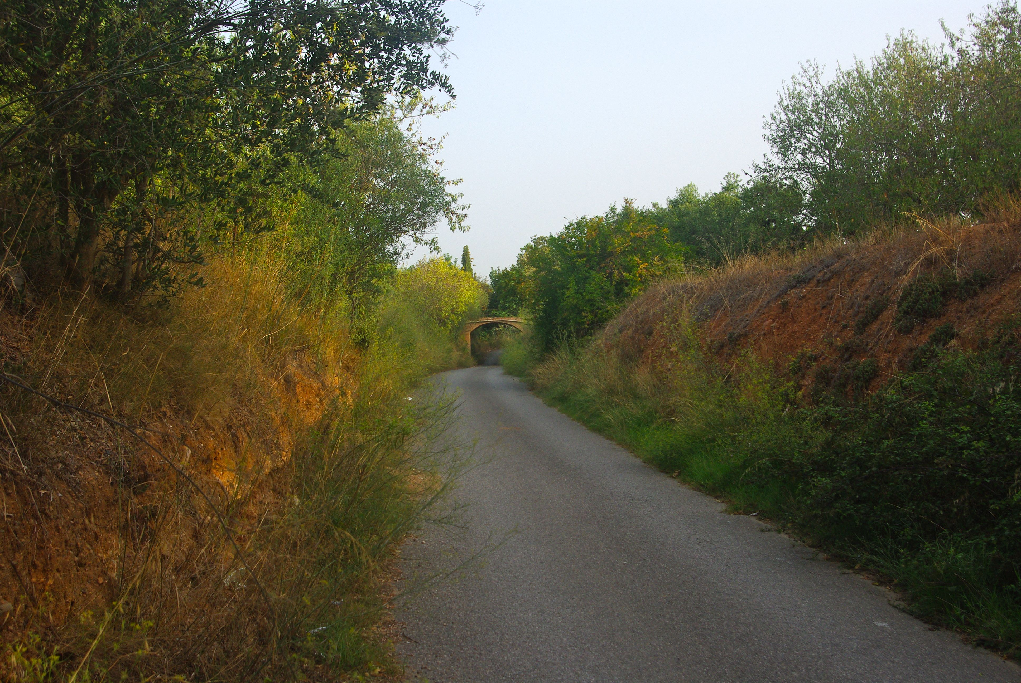 Tram del Camí Vell de Salou, prop de la seva sortida